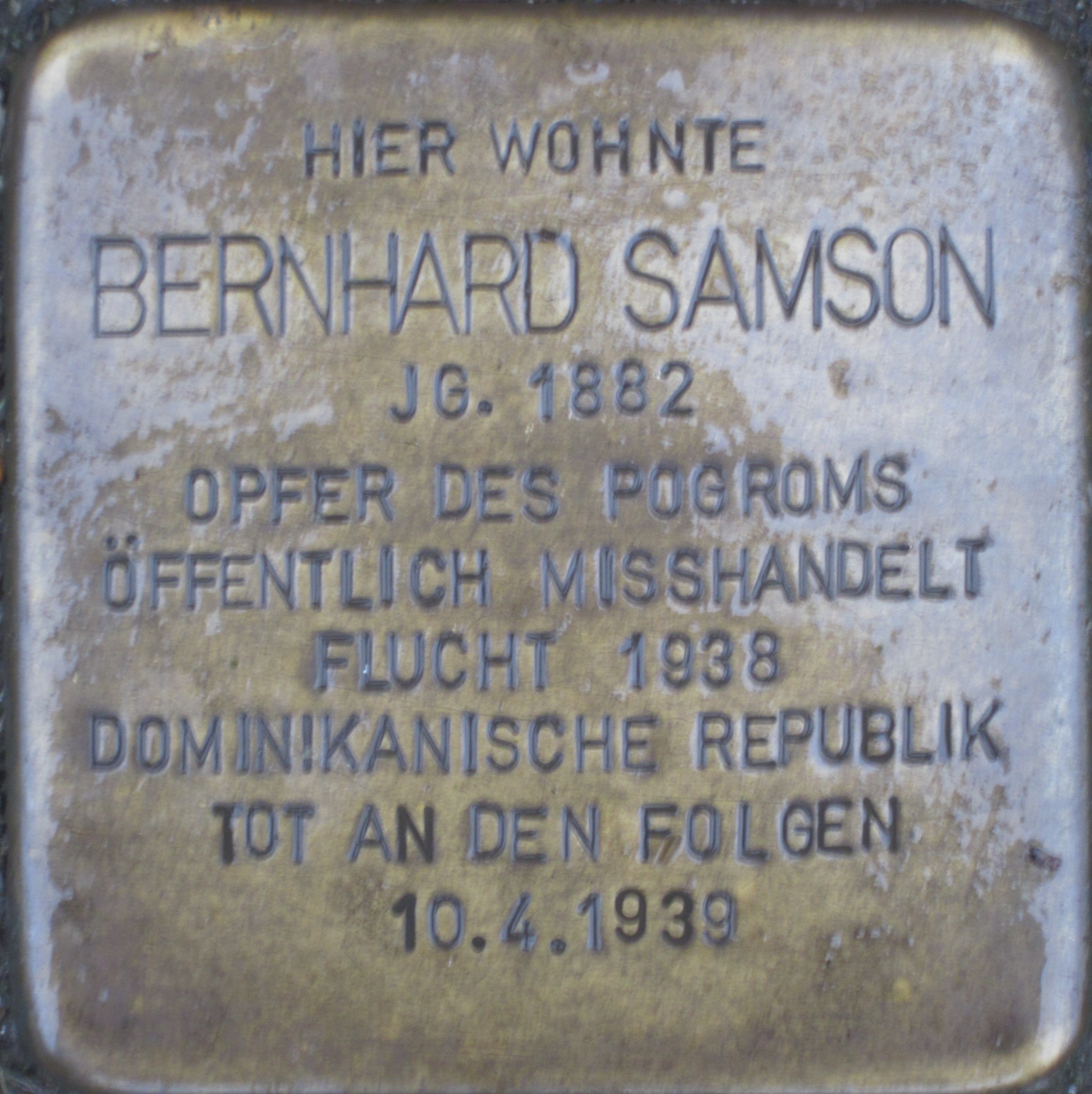 Stolperstein von Bernhard Samson in Lünen